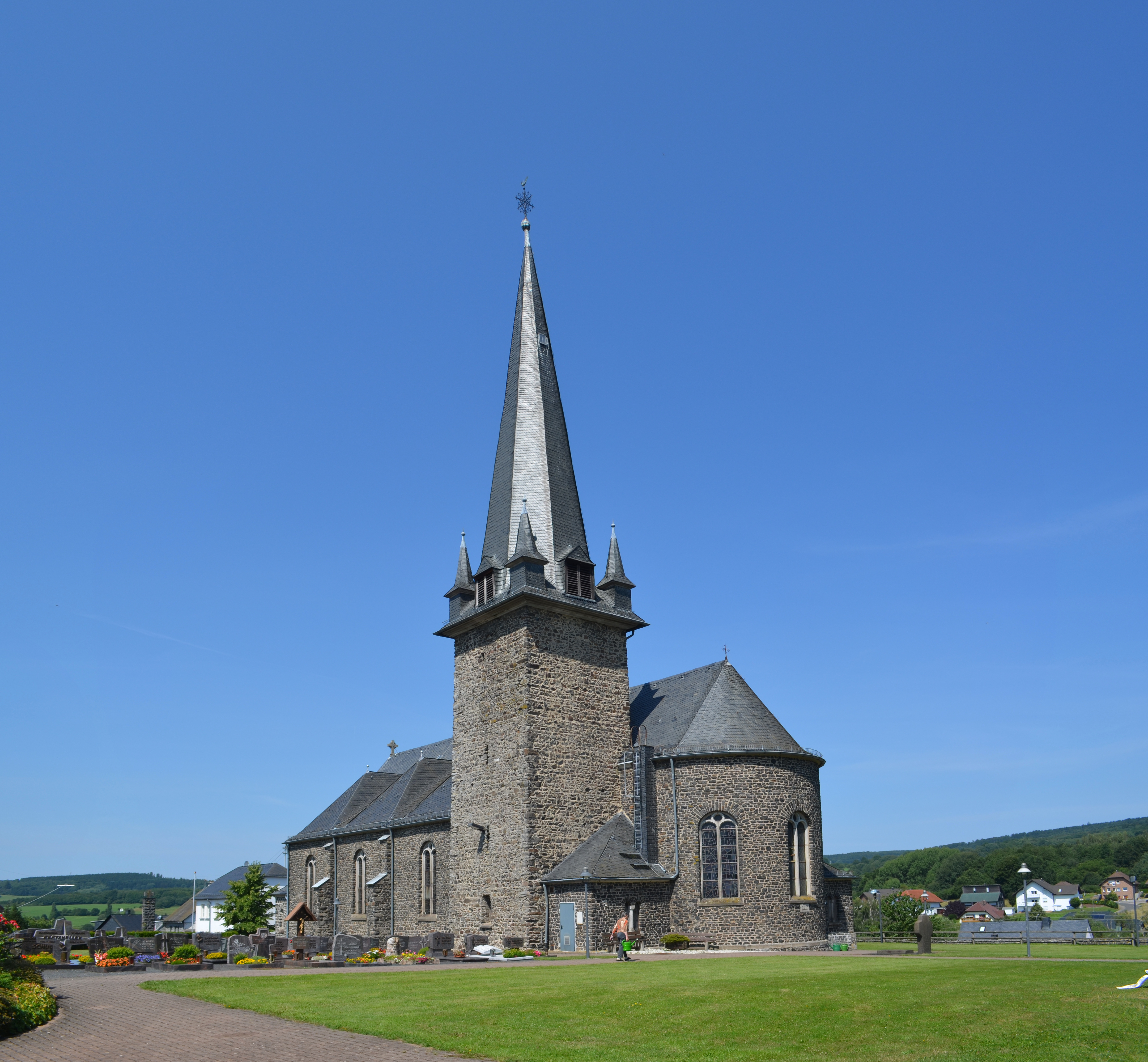 Elsoff, Kirche, Rückseite